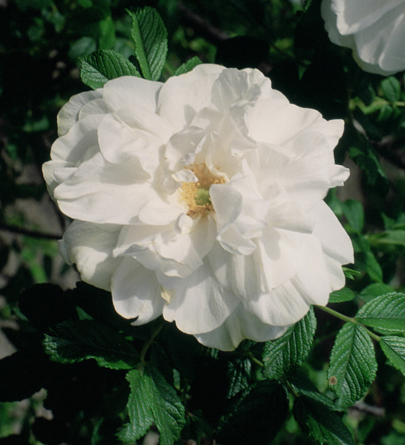 Rosa 'Blanc Double de Coubert', hybr. Rugosa, sect. Cassiorhodon. Real Jardín Botánico de Madrid, mayo 1987, A. Barra.